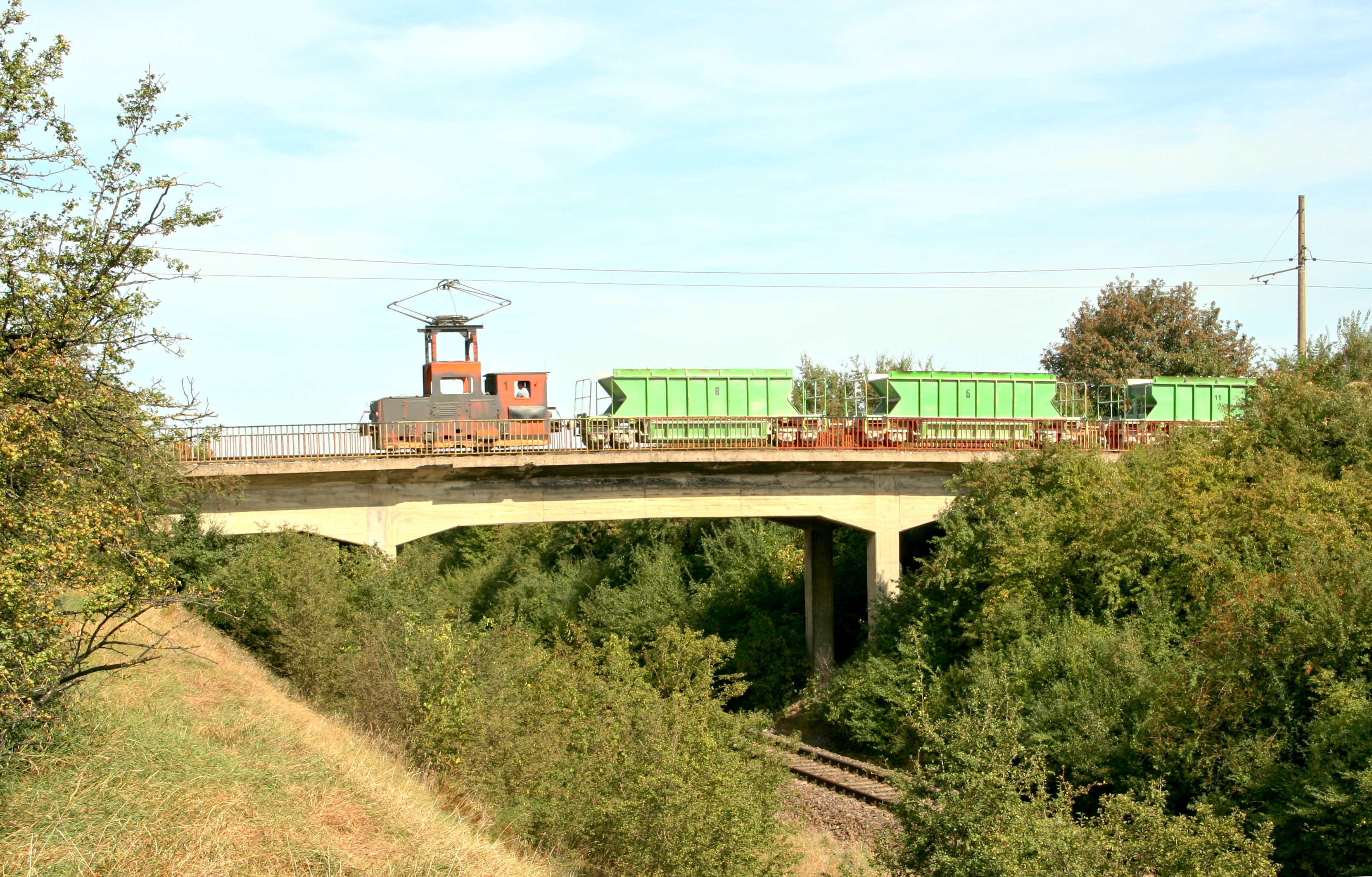 Lok 1 (LEW 16704/1983, EL 12) der Feldbahn des Sodawerkes Staßfurt auf der Brücke über die Bahnlinie Schönebeck - Güsten am 10. September 2012